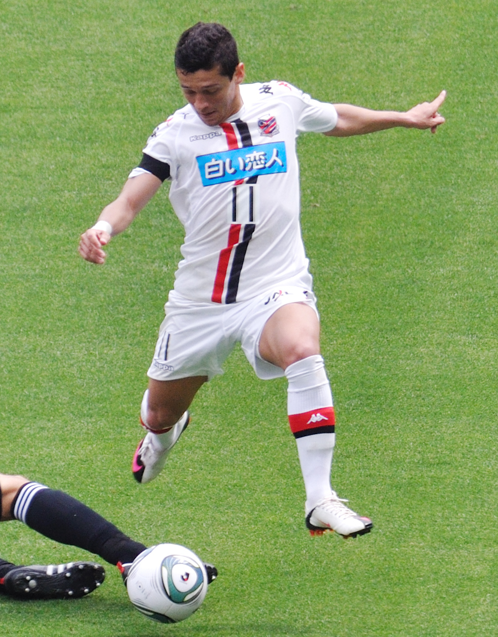 Andrezinho goes past Gonda